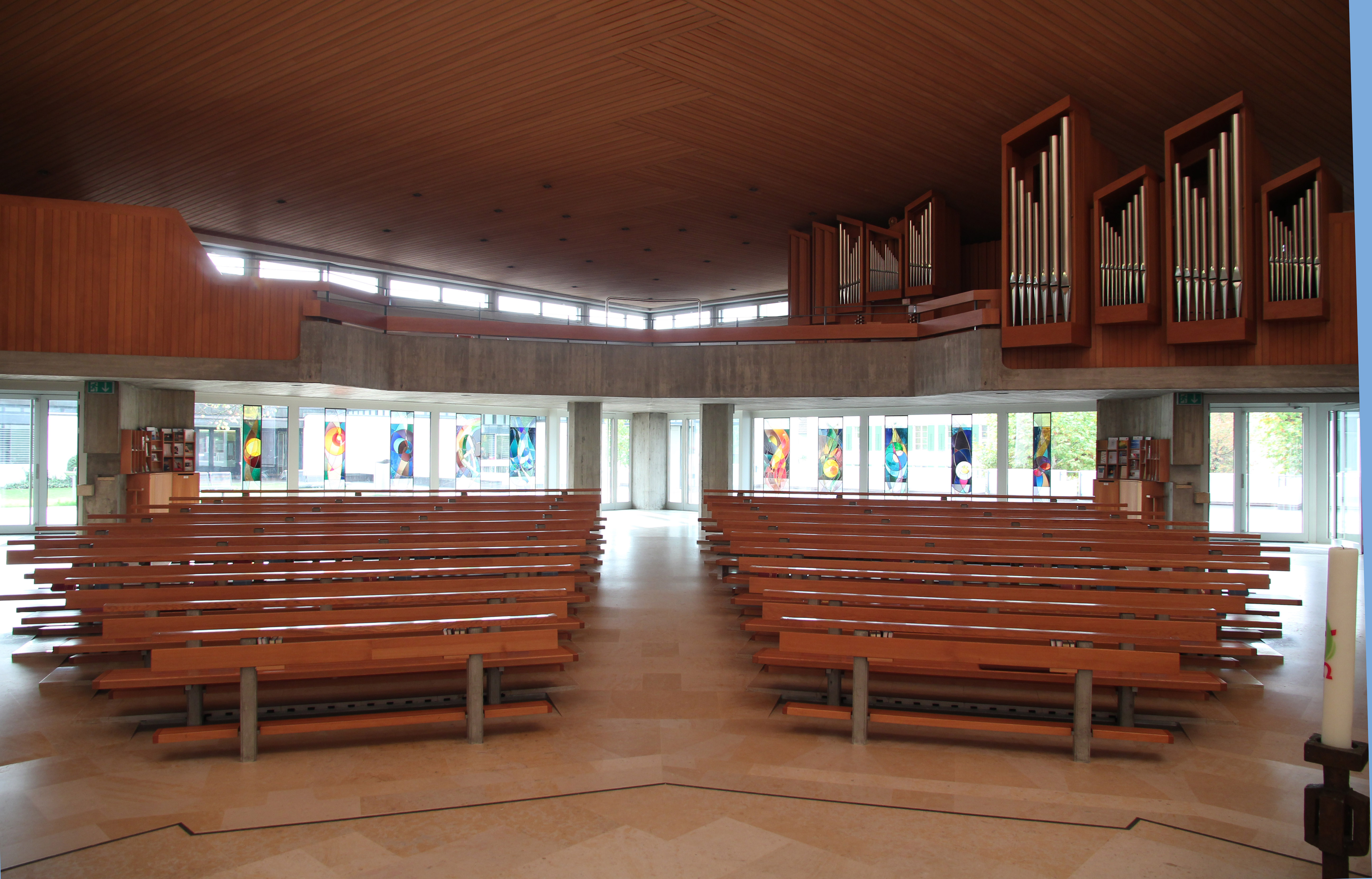 Römisch-katholische Pfarrkirche St. Andreas Uster, Blick zur Orgelempore